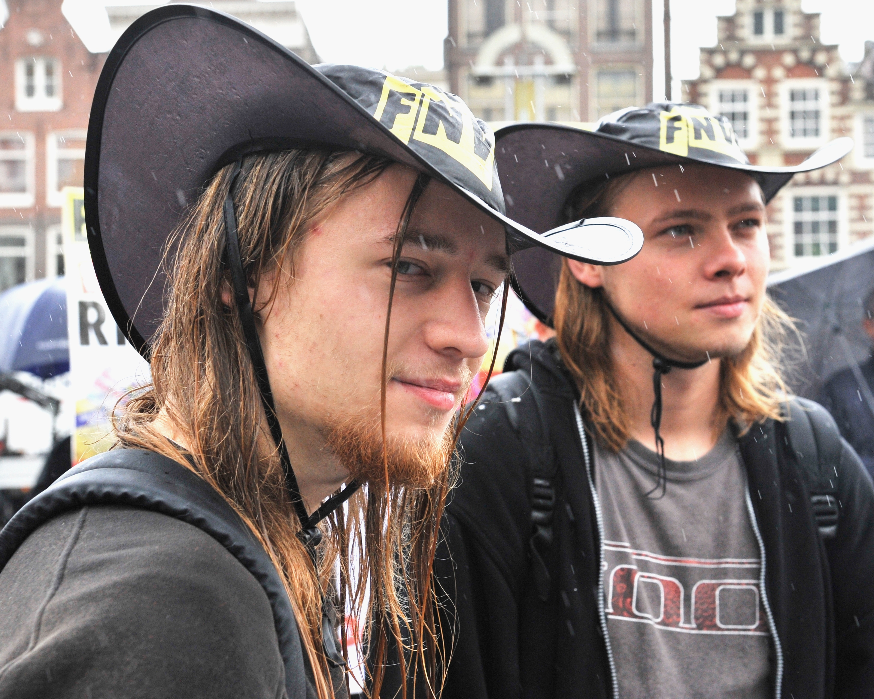 AMSTERDAM - Op verschillende plaatsen in Nederland werd woensdag actie gevoerd tegen de plannen van het kabinet om de AOW-leeftijd te verhogen. Op de Nieuwmarkt in Amsterdam voerde het FNV, ABVA/KABO en de SP actie.